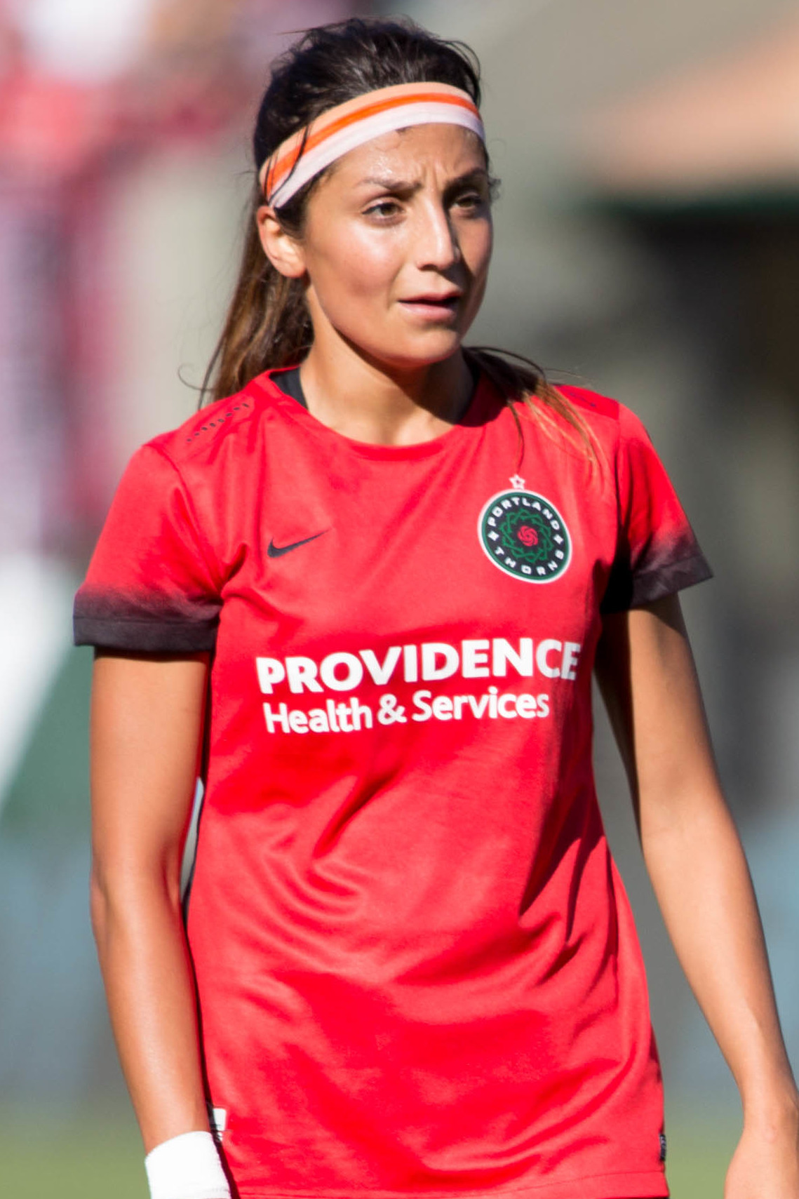 Nadia Nadim in September 2016